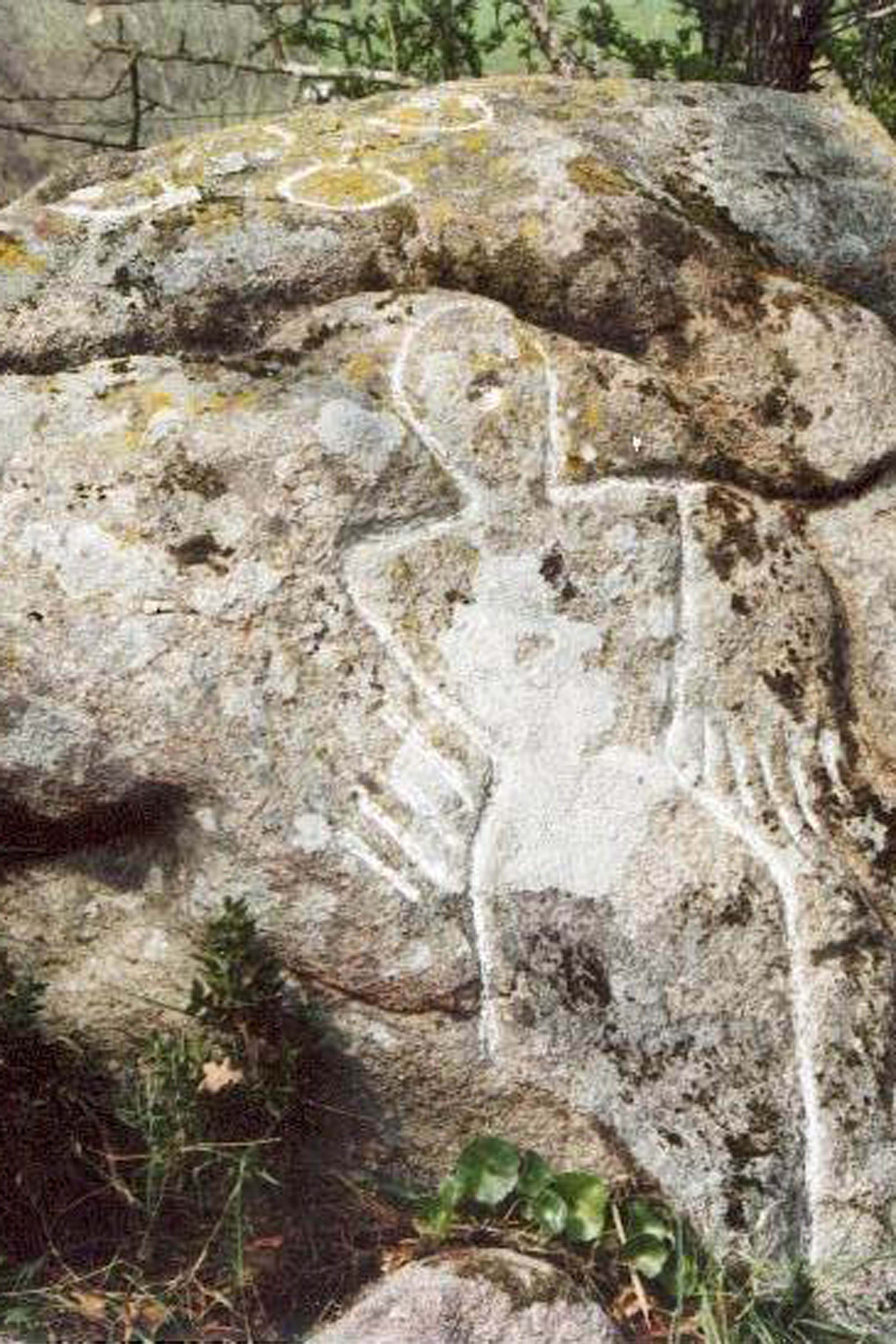 Pierre des Vaux Saint-Aubin-de-Baubigné 1